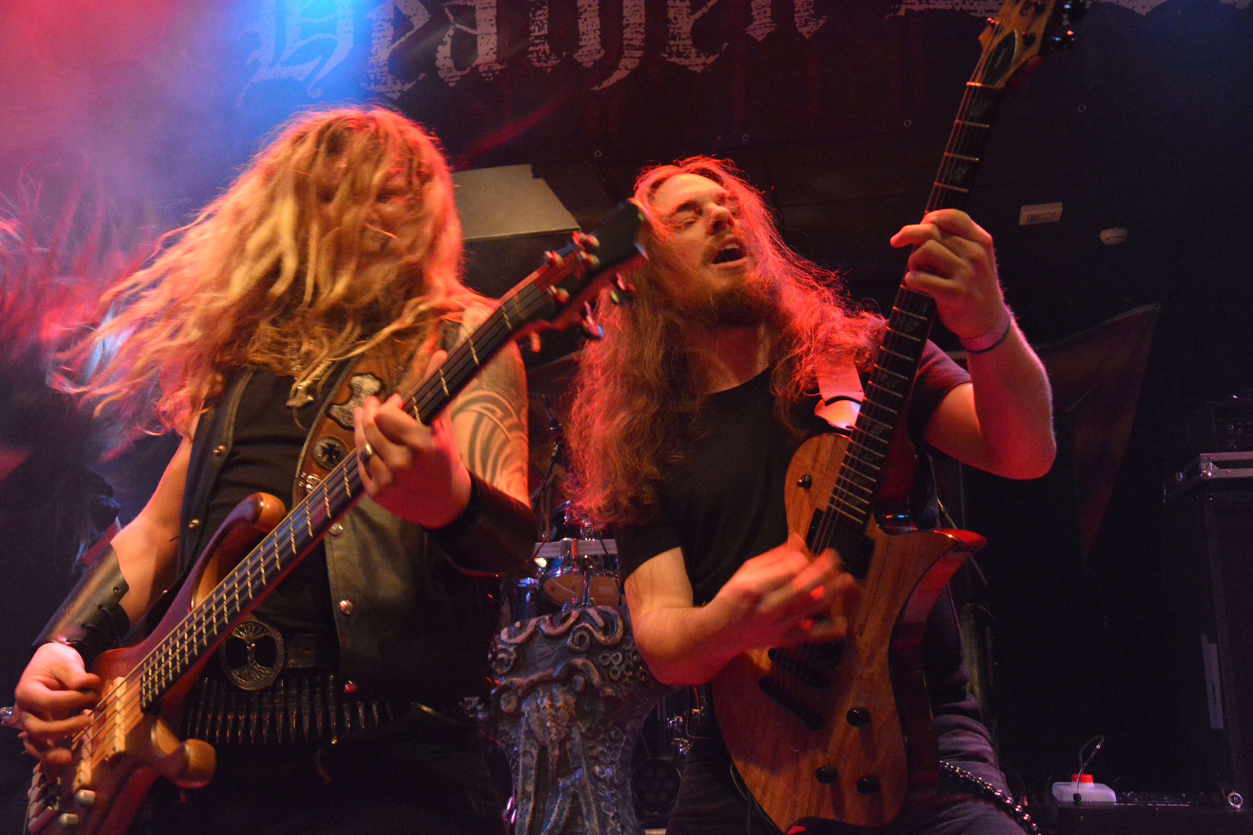 Adorned Brood beim Heathen Rock Festivals 2014 im Rieckhof in Hamburg-Harburg